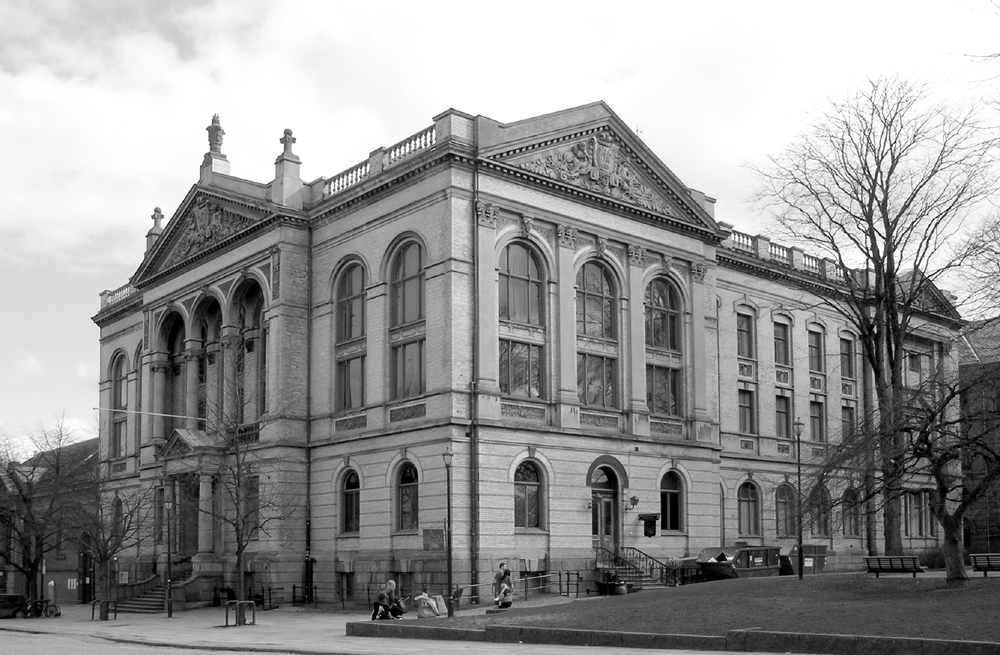 Frimurerlosjen, Kongens gate 3, Trondheim. Bygd 1899. Arkitekter: Karl Norum, Johan Christensen, Lars Solberg, Axel Guldahl d.e. og flere.